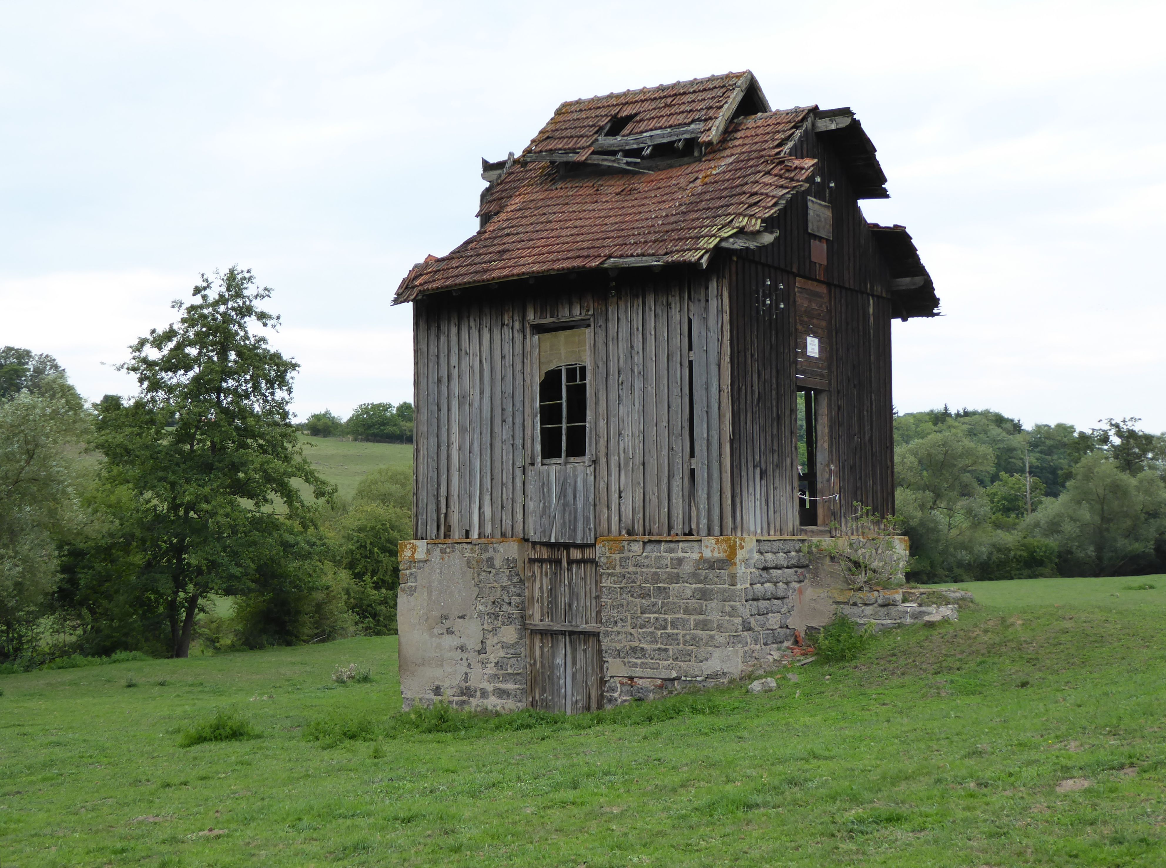 Puits d'injection des sondages salins de la vallée de la Roanne datant de la fin du 19ème siècle, situé sur le territoire de la commune de Lenoncourt (Bonval).